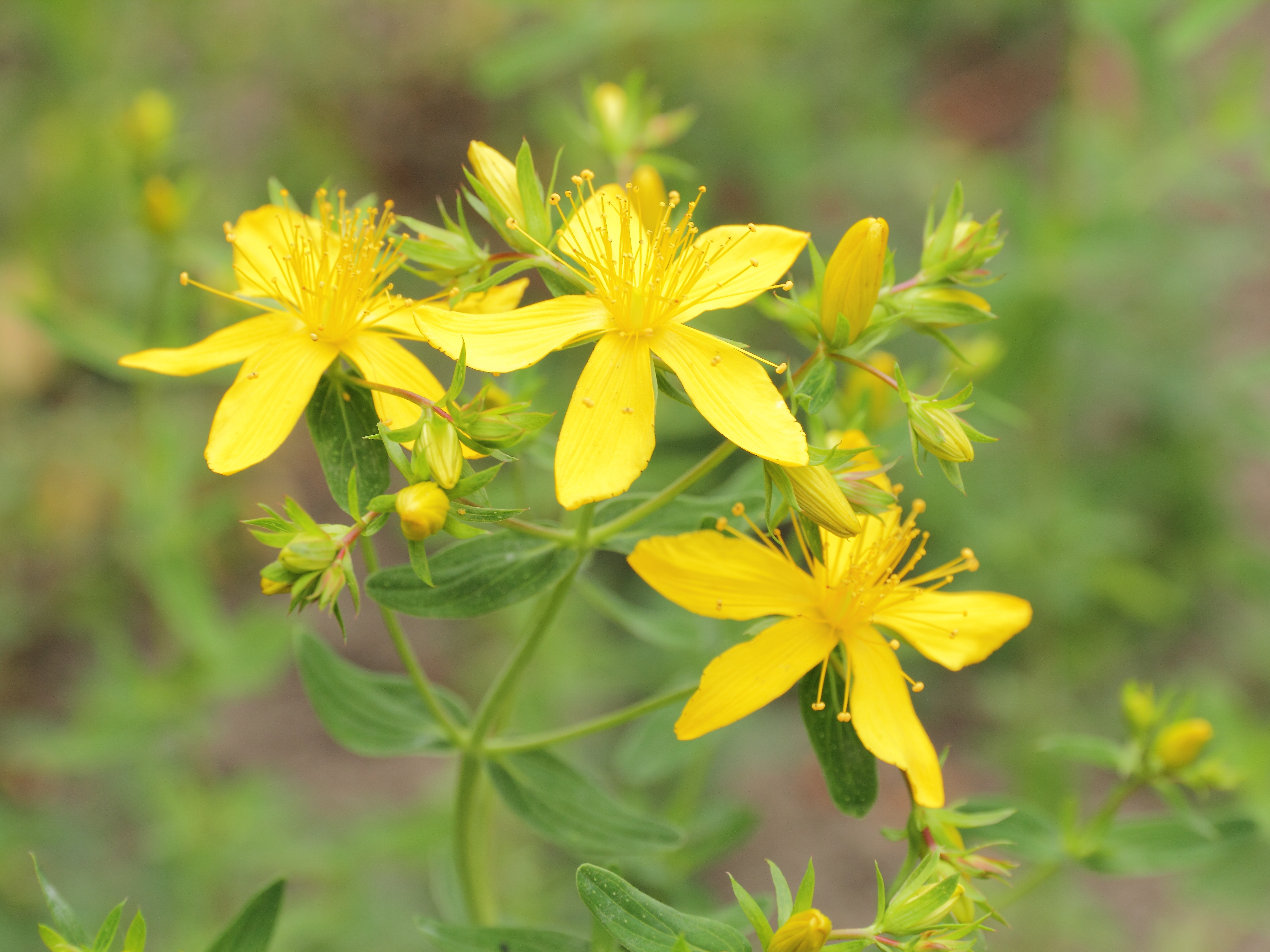 Hypericum perforatum i Bergianska trädgården.